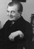 Alexander Tcherepnin